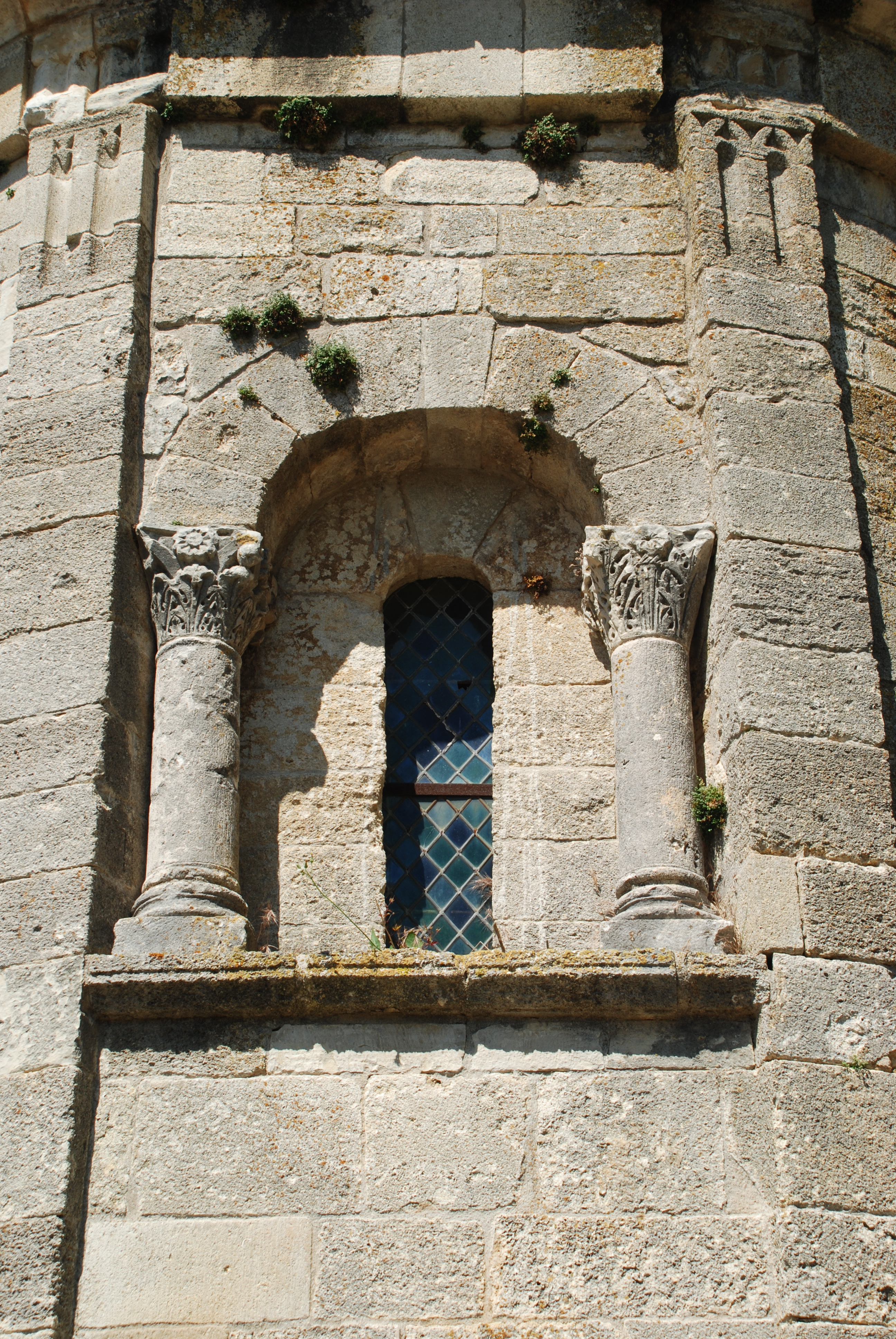 France - Provence - Église de Saint-Trinit